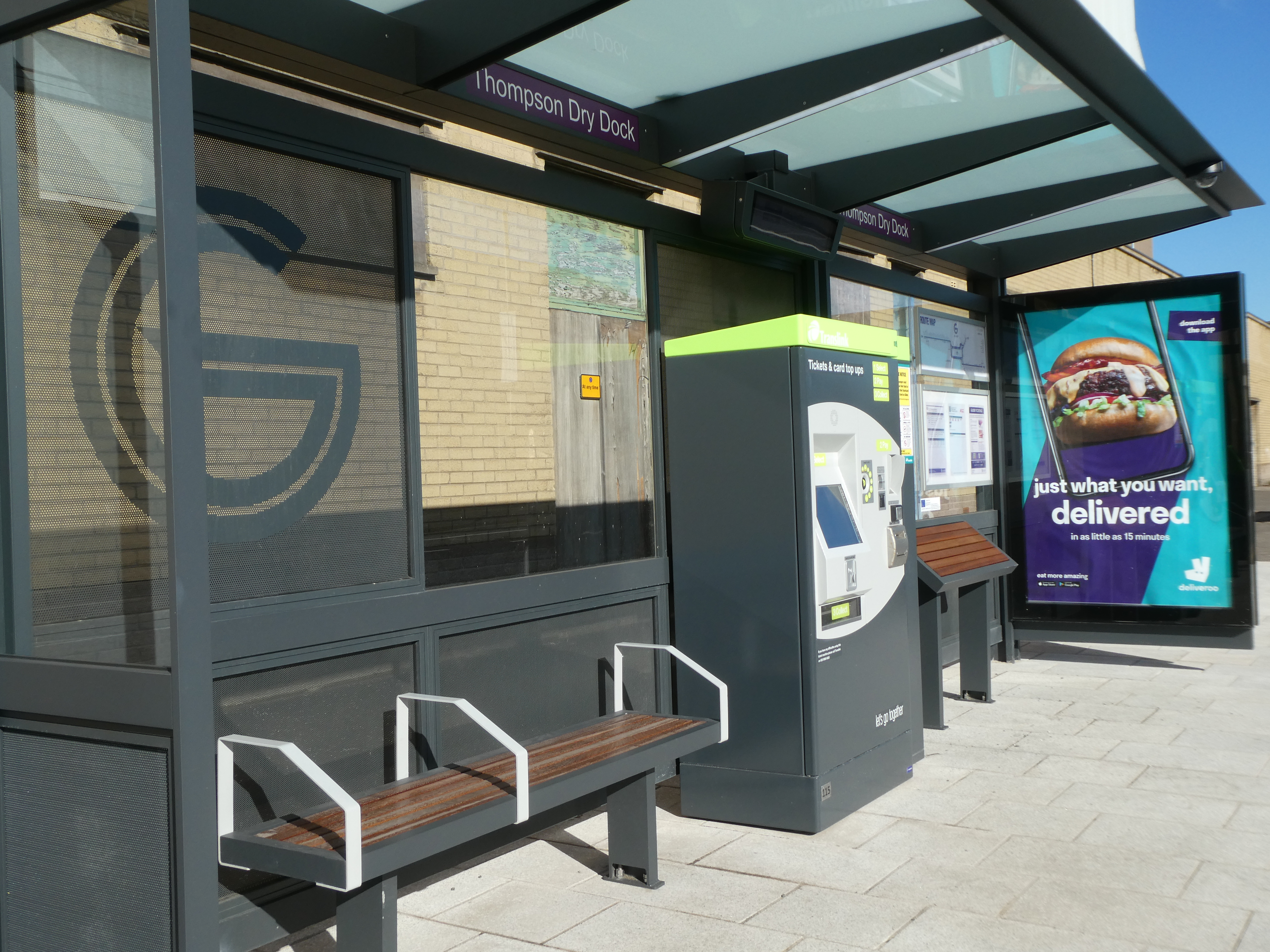 GliderBus-Belfast-ThompsonDryDock-P1510160